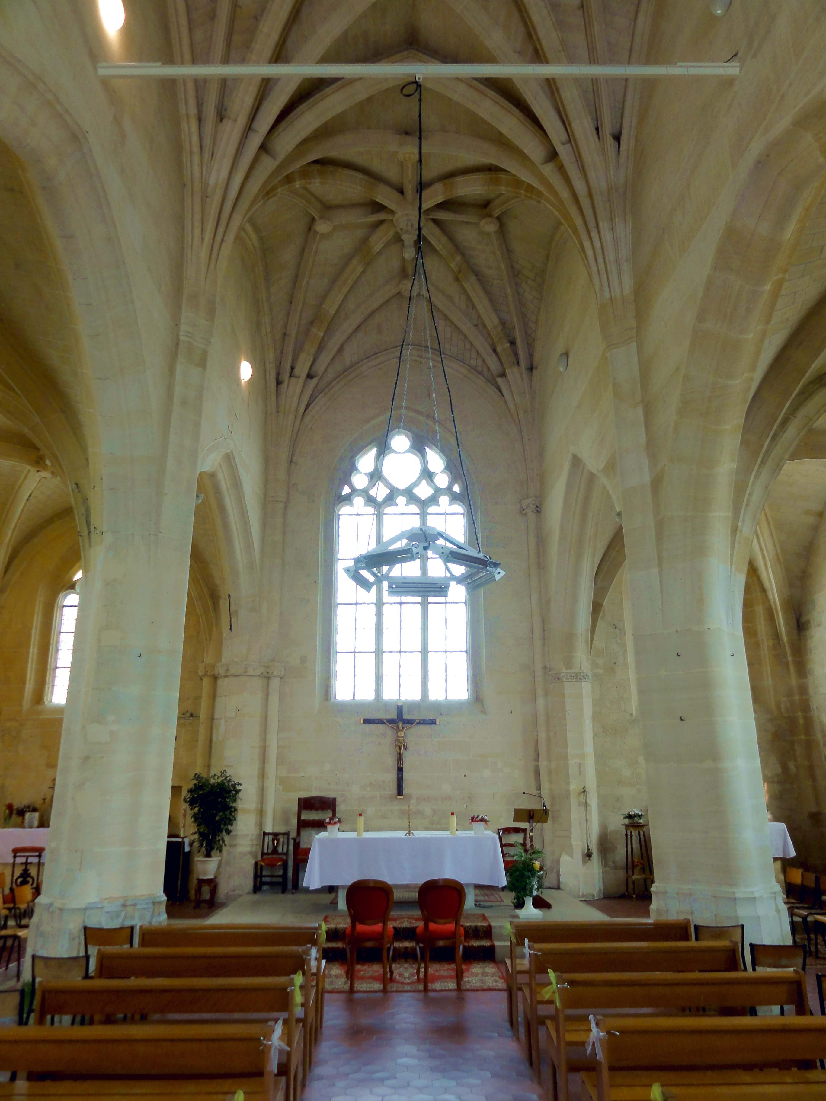 Intérieur de l'église - voir titre.